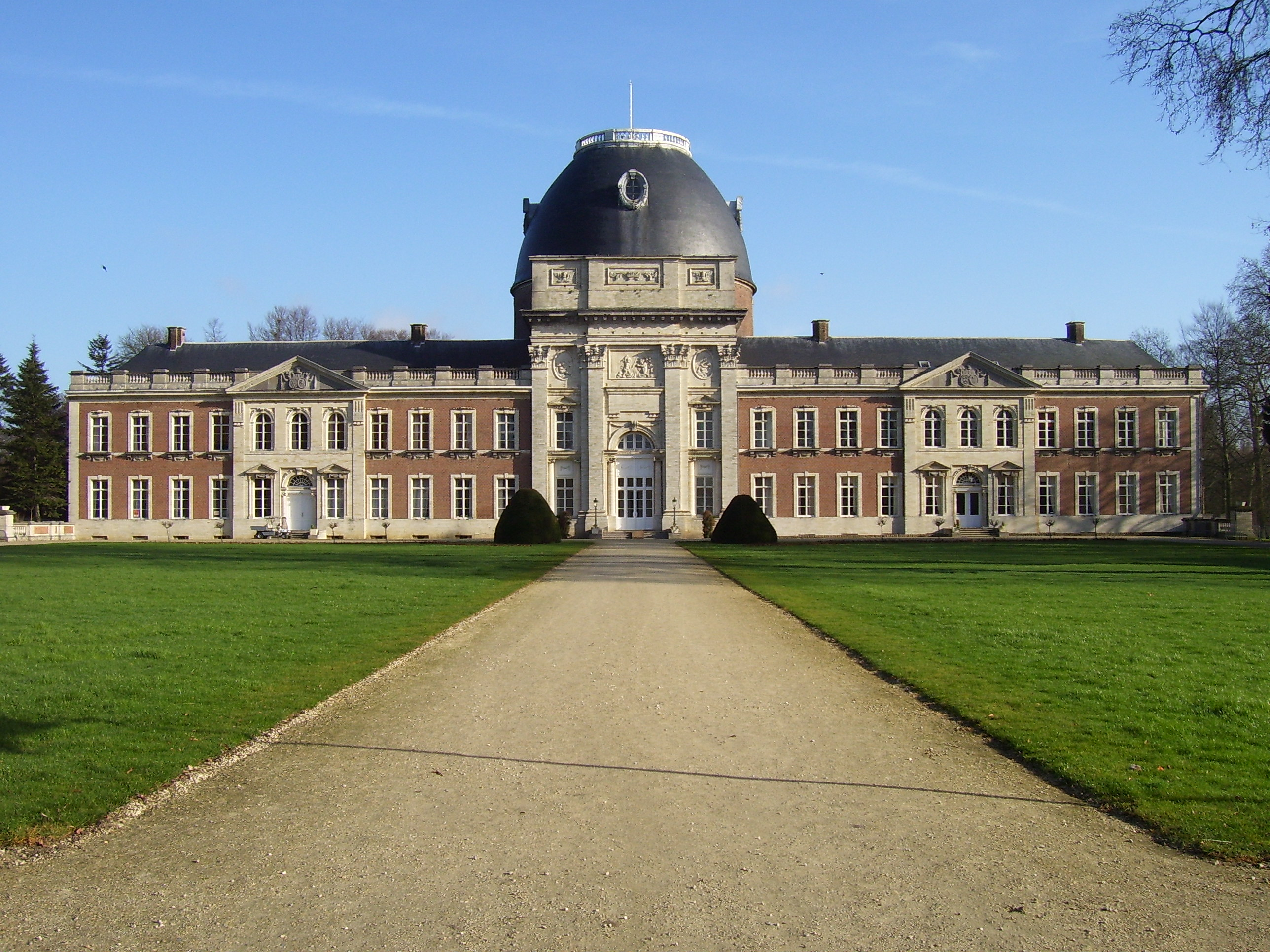 Domaine provincial (manor house/palace) of Hélécine, Belgium